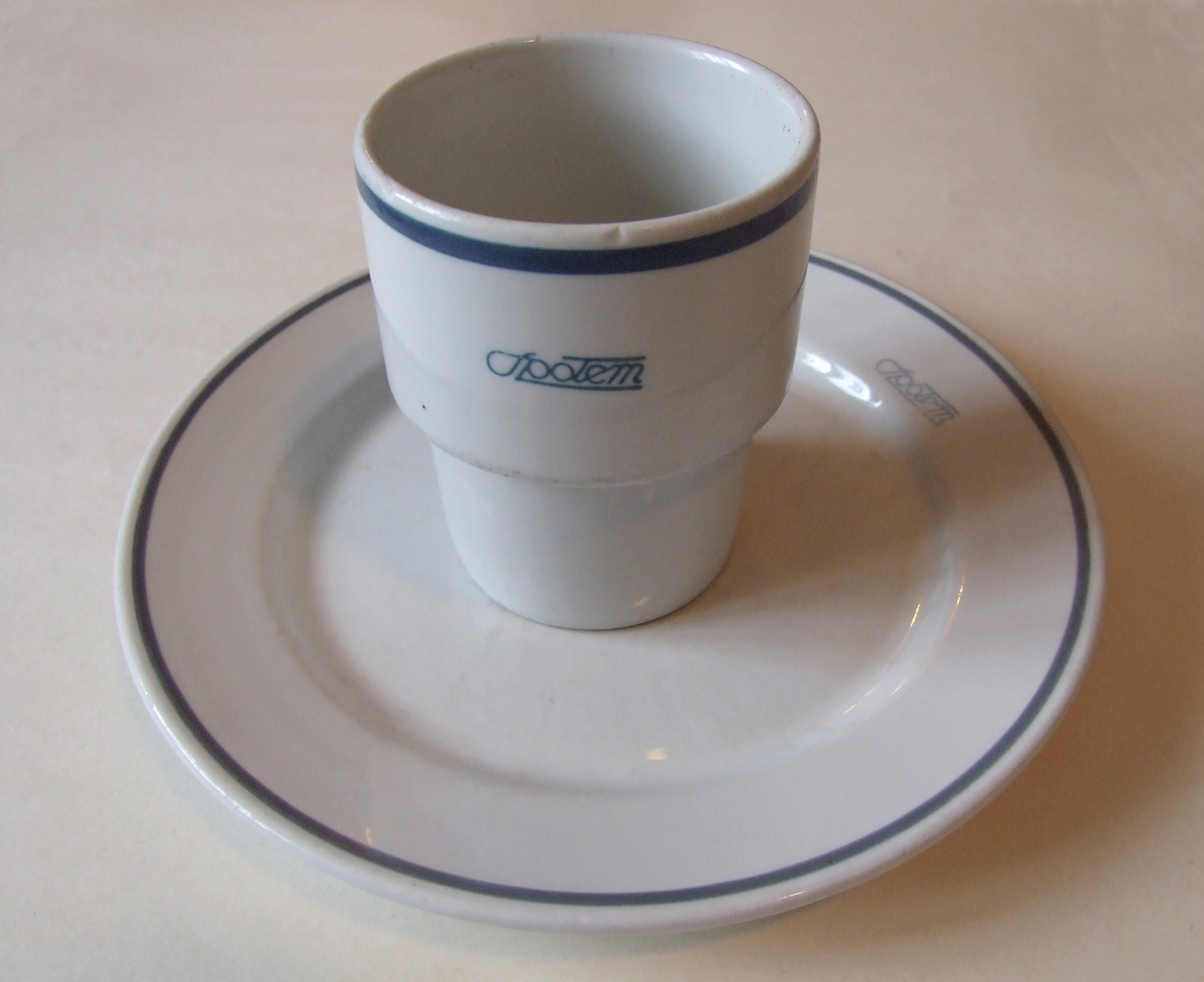 Zastawa stołowa "Społem" z wczesnych lat 80. Autor: Mohylek 15:33, 3 March 2007 (UTC)